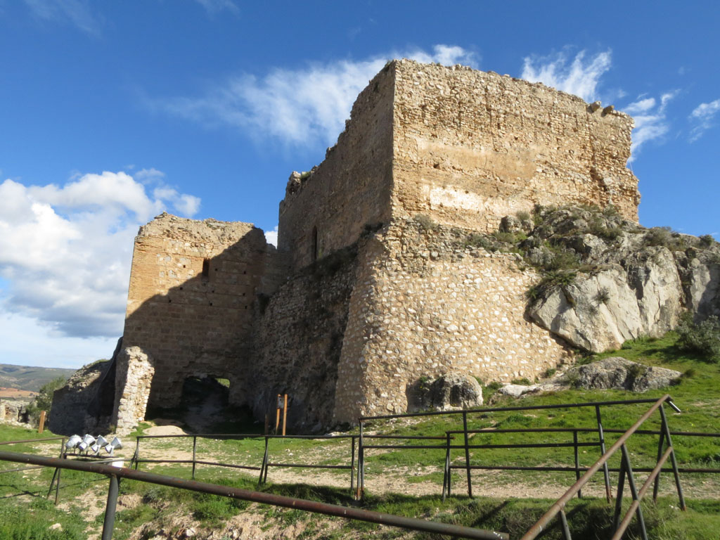 Castillo fortaleza de Ayora, duque del infantado, marquesado de Zenete. (Imagen cedida por M. Martínez)